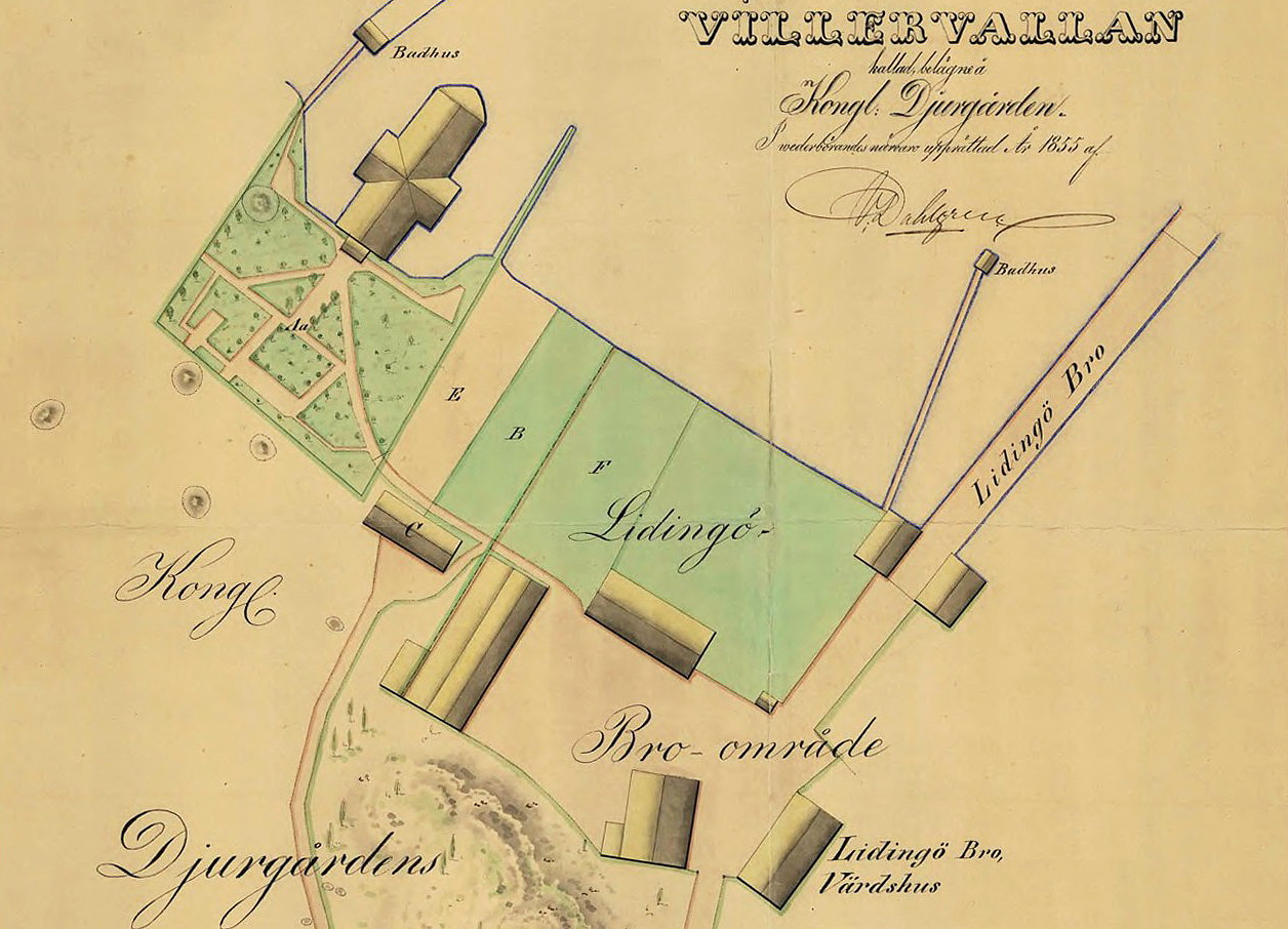 Historisk karta över området vid Lidingöbro värdshus invid Lilla Värtan vid Kaknäs öster om Kungl. Djurgården. Kartan skapad 1855 (Beskuren)